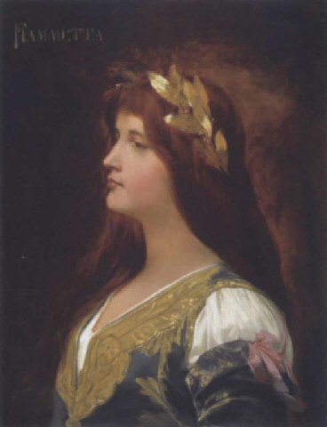 Fiammetta